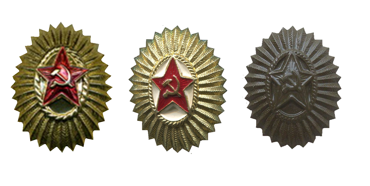 Кокарды СССР